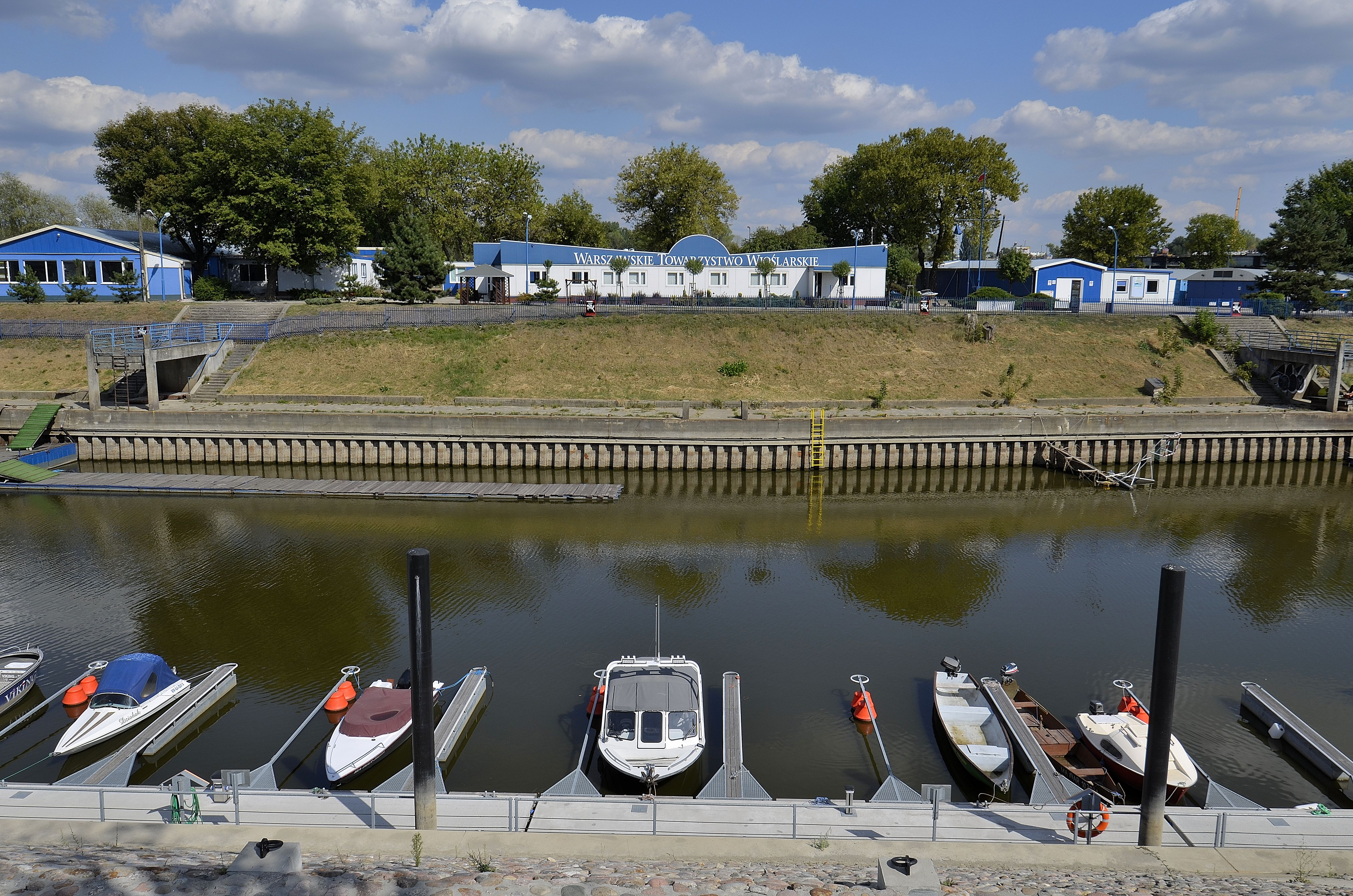 Port Czerniakowski w Warszawie